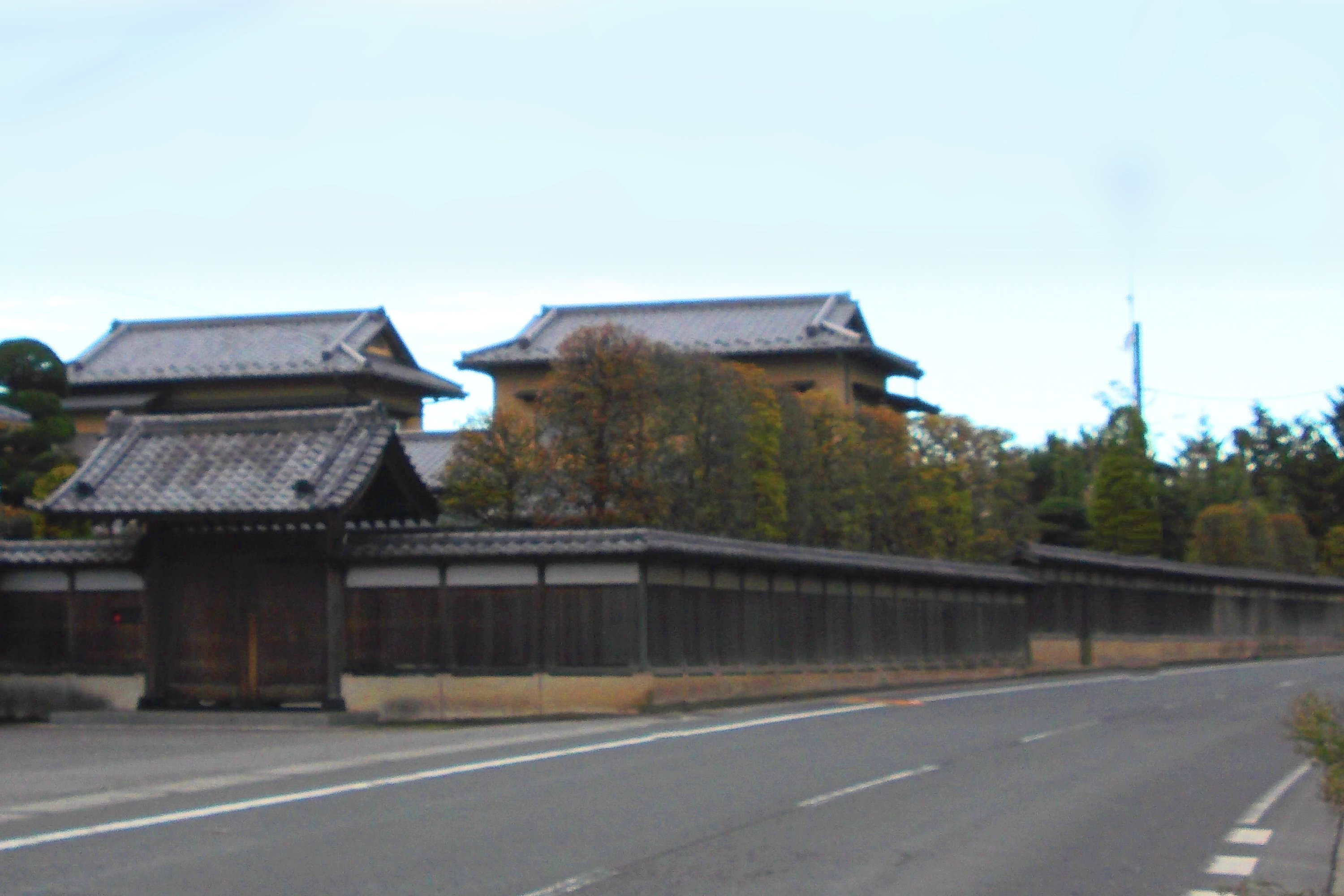 船形景観（野田市）